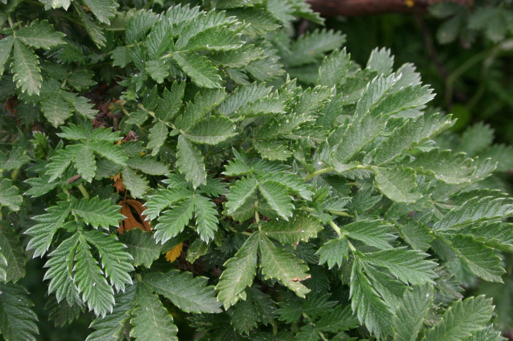 Leucosidea sericea foliage